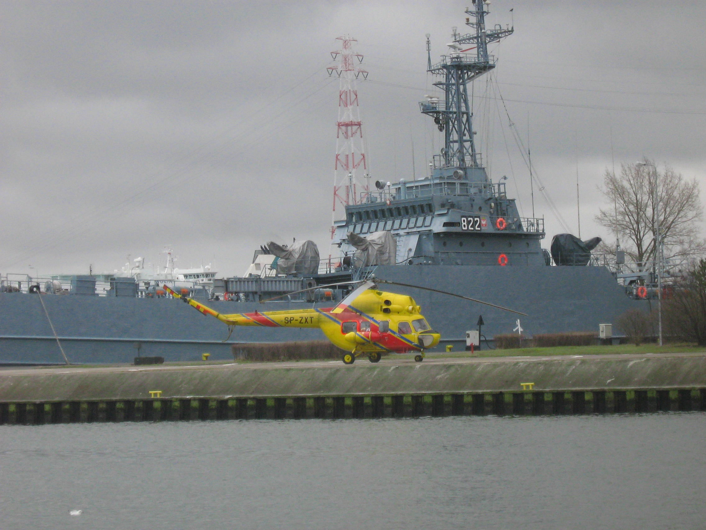 Mi-2 w wersji dla Lotniczego Pogotowia Ratunkowego. W tle ORP Gniezno.